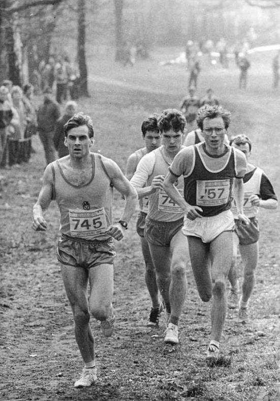 Steffen Dittmann, Frank Heine, Andre Weßel ADN-ZB Lehmann 19.3.89 Bez. Halle: XXVI. DDR-Cross-Meisterschaften- Überraschungssieger auf der langen Distanz von 11,5 km wurde Steffen Dittmann (Nr. 745) vom ASK Vorwärts Potsdam. Er verwies den favorisierten dreifachen DDR-Meister Frank Heine (M.), ebenfalls ASK Vorwärts Potsdam, auf Rang zwei, Dritter wurde Andre Weßel (SC Dynamo Berlin- Nr. 757).